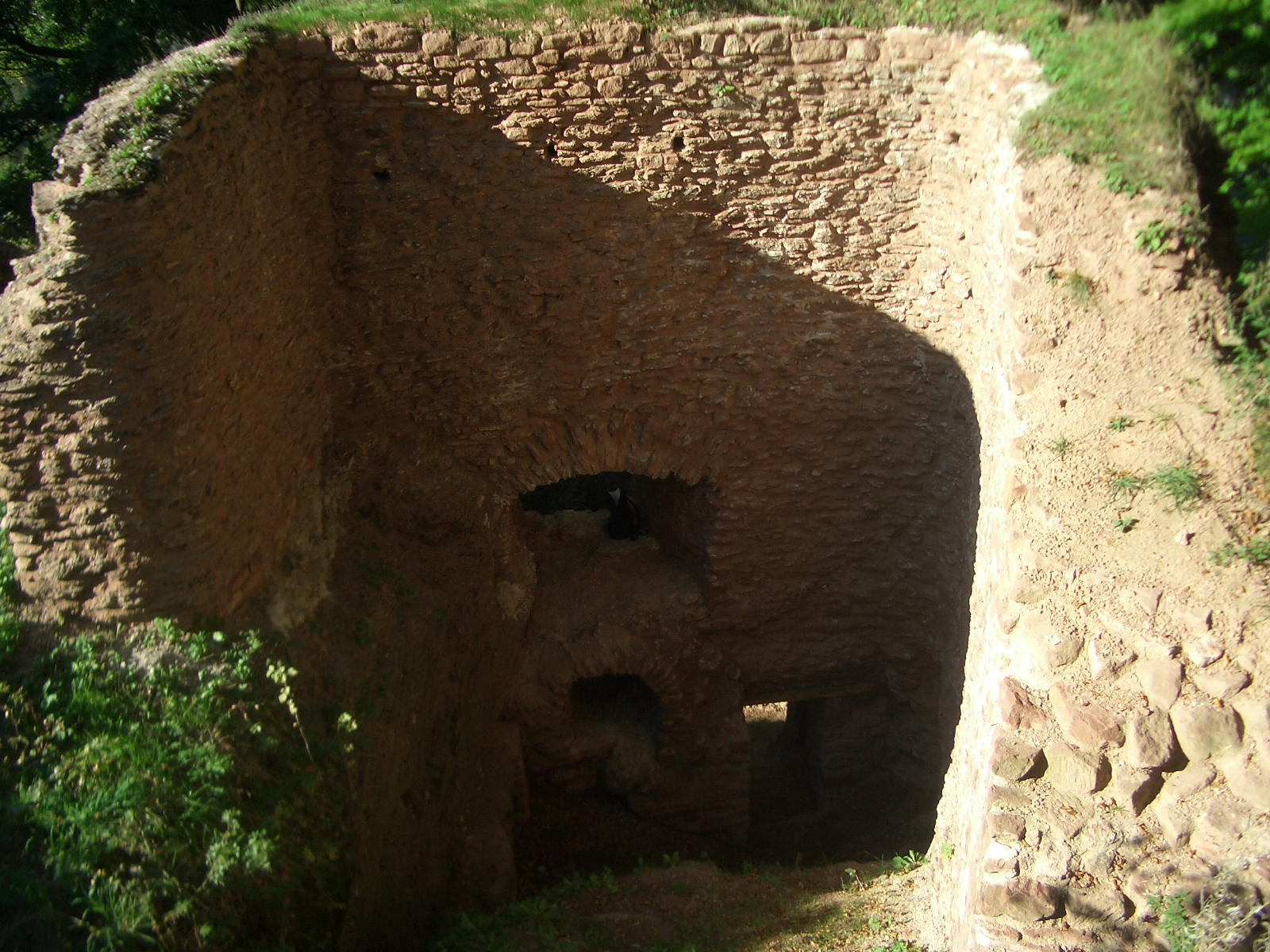 Interiér hradu Břecštejn